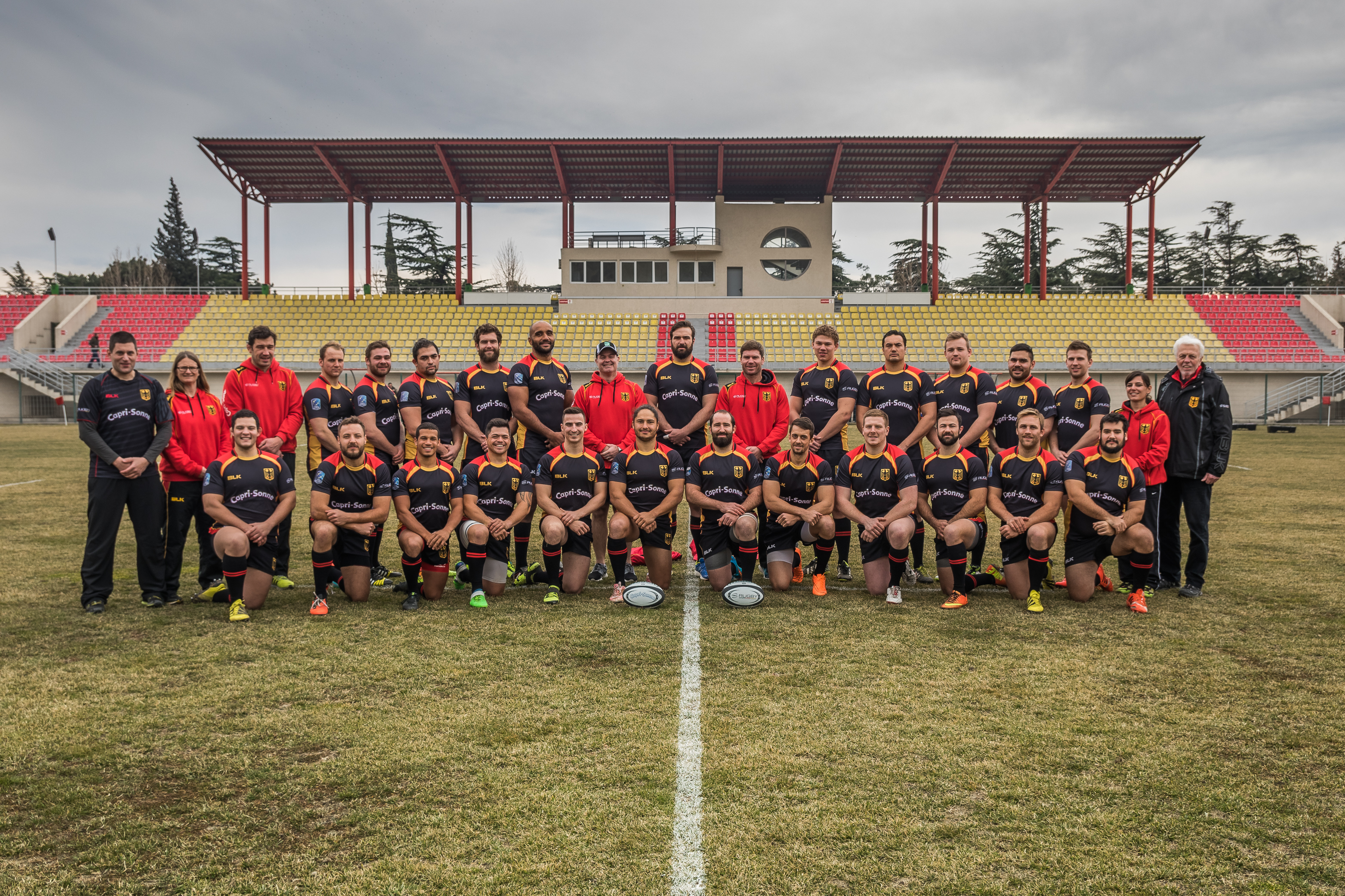 Die deutsche 15er Nationalmannschaft vor dem EM-Auftakt gegen Georgien in Tifli im Februar 2016